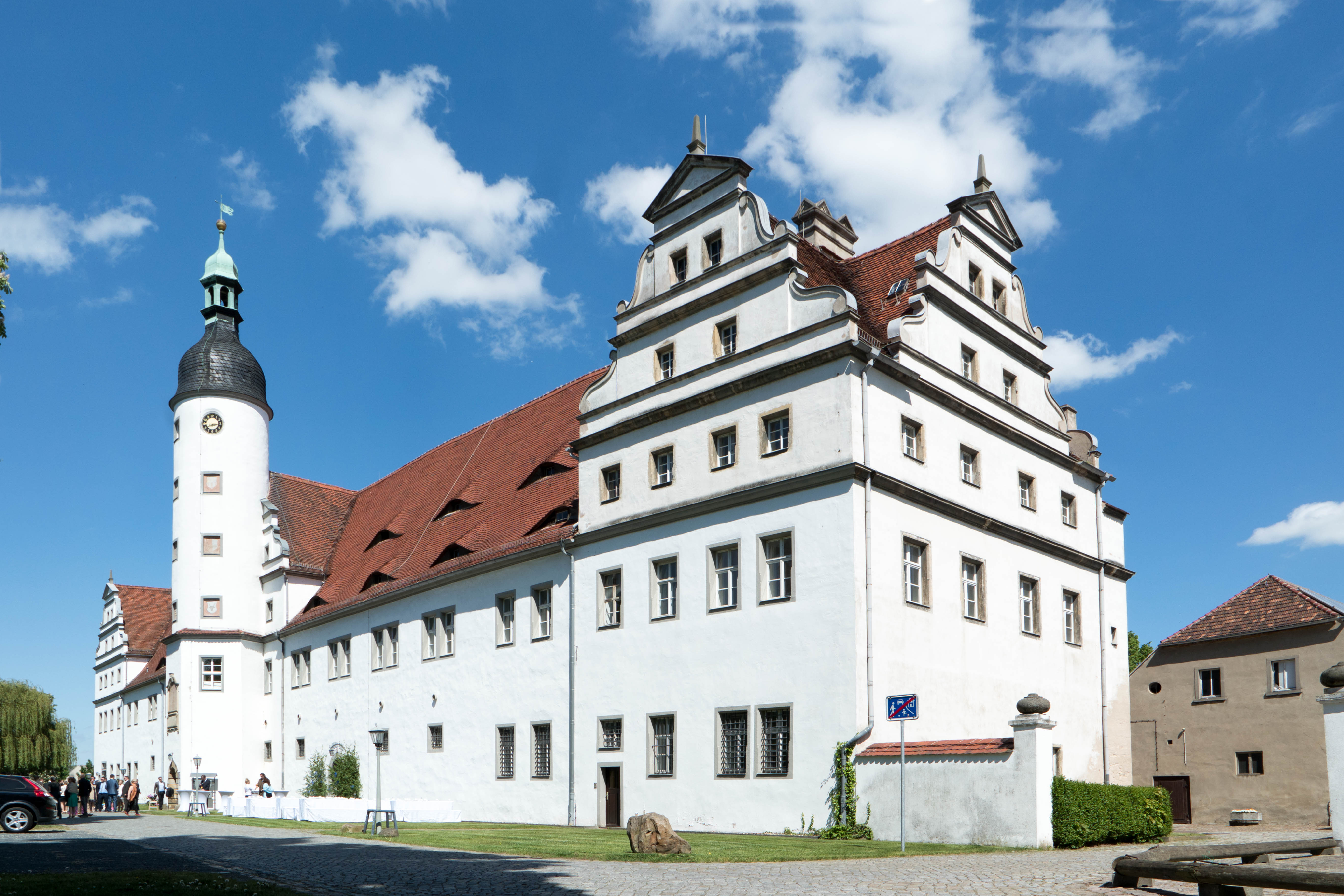 Kurfürstliches Stallgebäude Zabeltitz, auch „Altes Schloß“ genannt